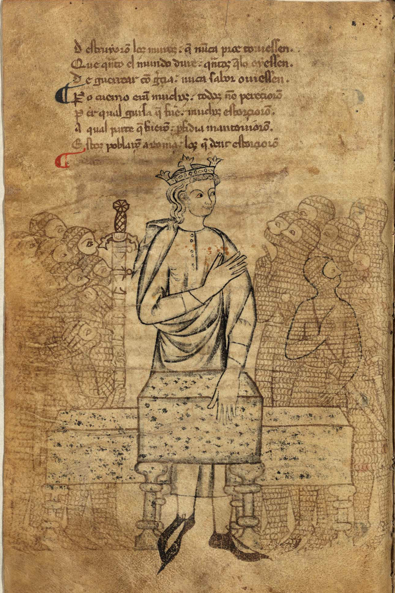 Hoja 45v del manuscrito O de la BNE del Libro de Alexandre (1ª mitad del siglo XIII), códice del S. XIV. 154 hojas de pergamino 26 x 17 cm. Tres dibujos a pluma. El primero, un rey entre soldados vestidos con cotas de malla (h. 45v.), que corresponde a esta imagen.